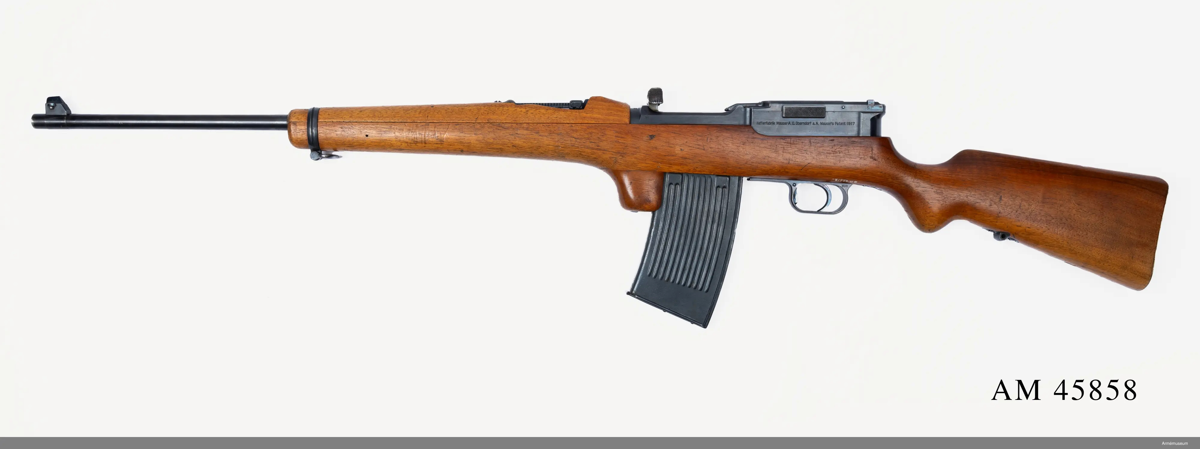 Grupp E IV. Halvautomatgevär, Tyskland. Mauser. 1917